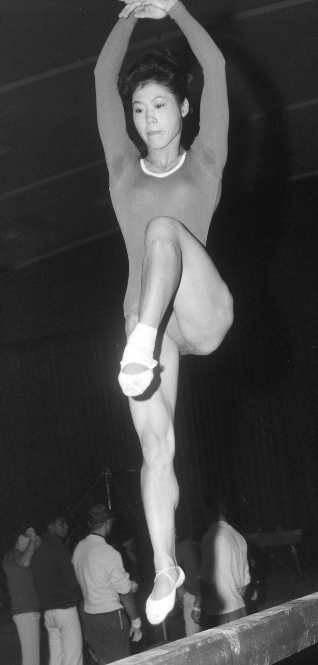 Wereldkampioenschappen turnen 1966 in Dortmunt. Taki Shibuya